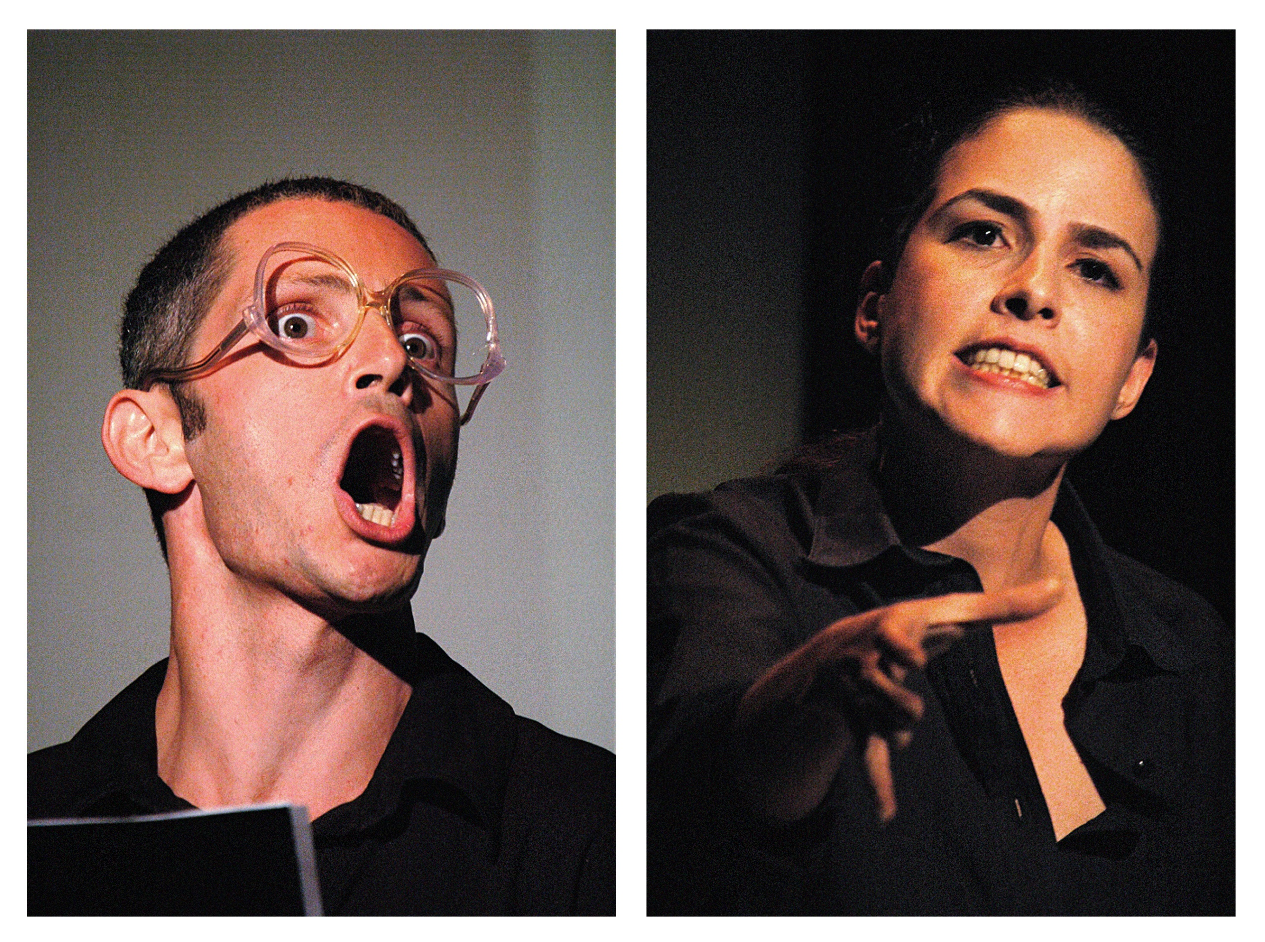 ההצגה ותו-לו